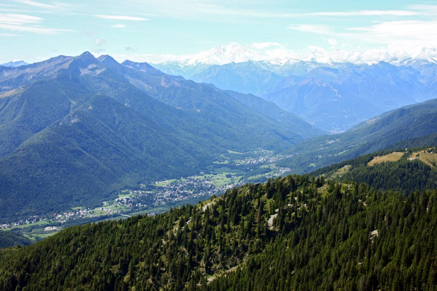 La Valle Vigezzo dalla cima del monte Ziccher (1967 m.s.l.m.). In primo piano l'abitato di Santa Maria Maggiore, più oltre Druogno.